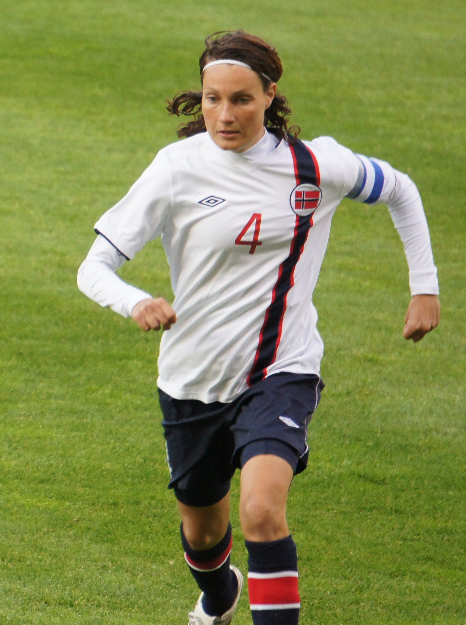 En équipe de Norvège.